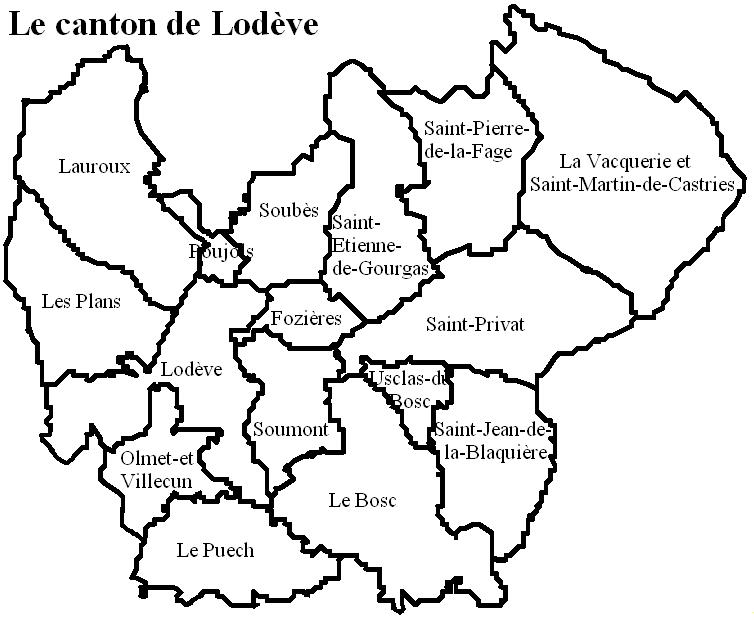 Le canton de Lodève Image personnelle